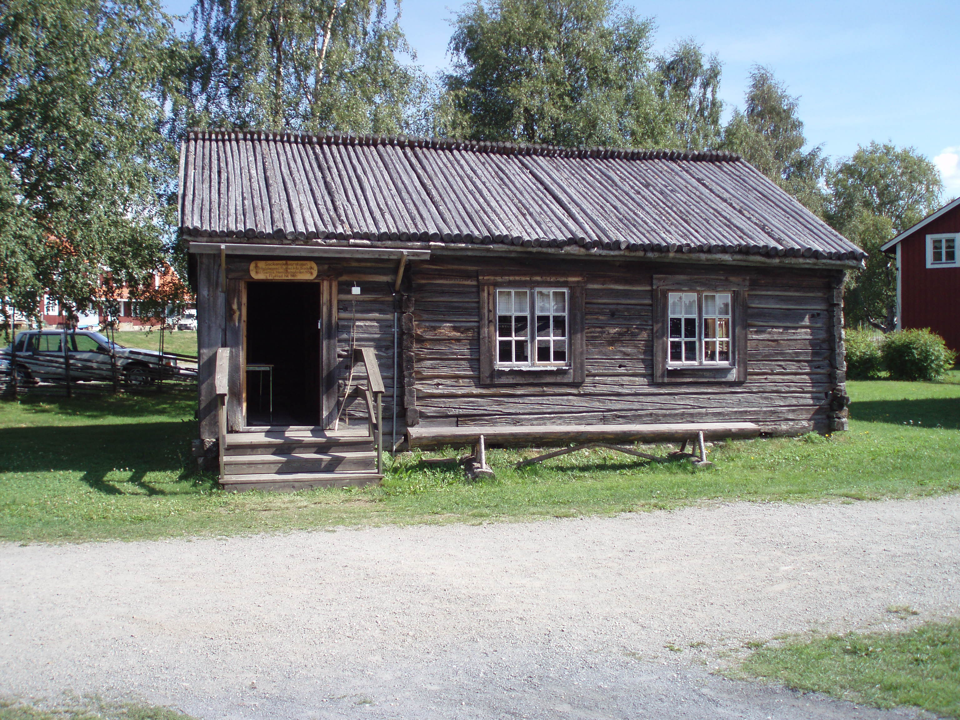 Strömsund, Sweden, Hembygsgården, sockenskrivarstugan. Photo taken in aug. 2006 by me - User:Cucumber